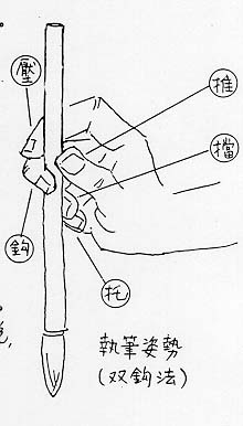 自製圖片